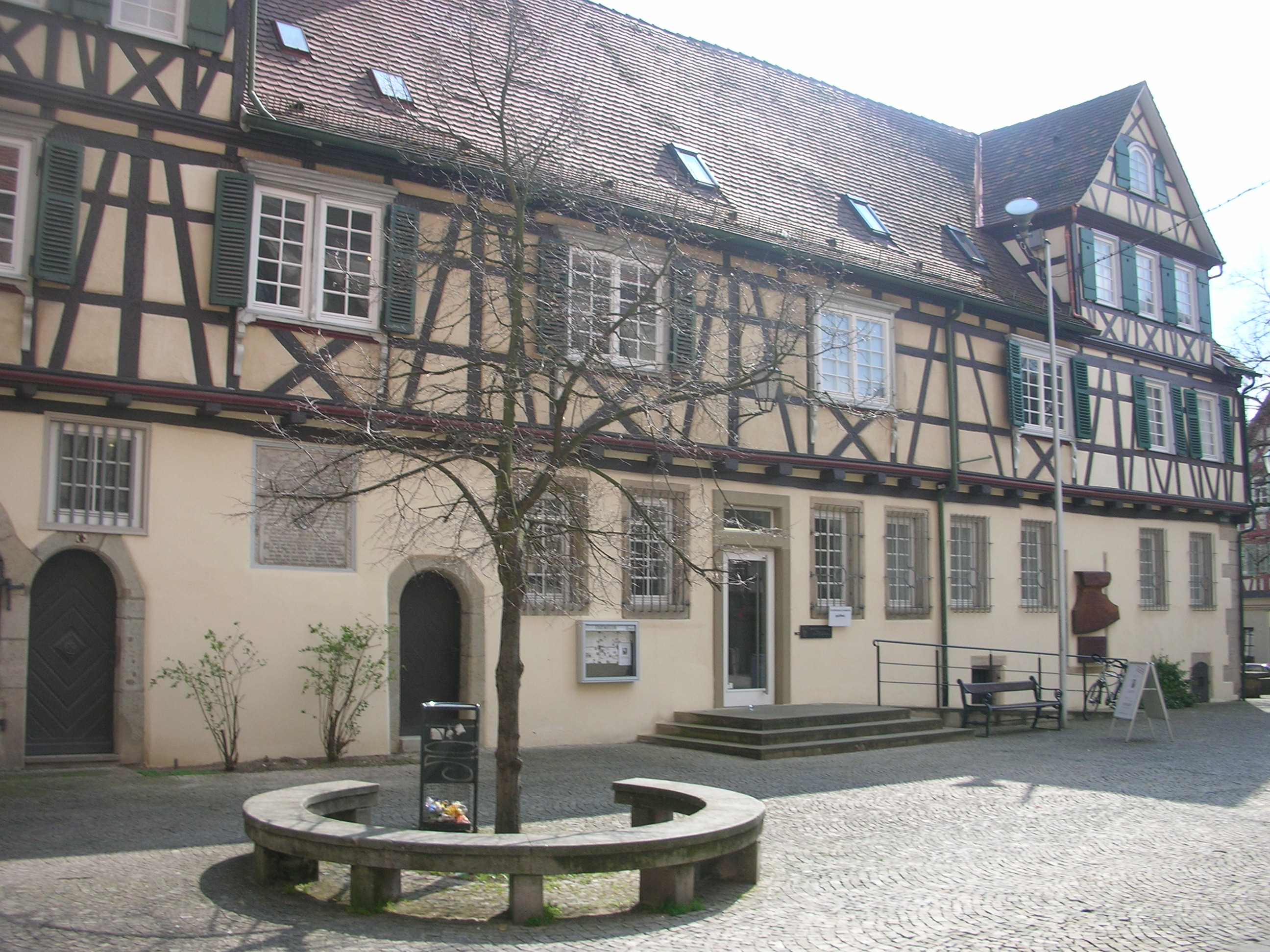 Stadtmuseum in der ehemaligen Lateinschule in Schorndorf